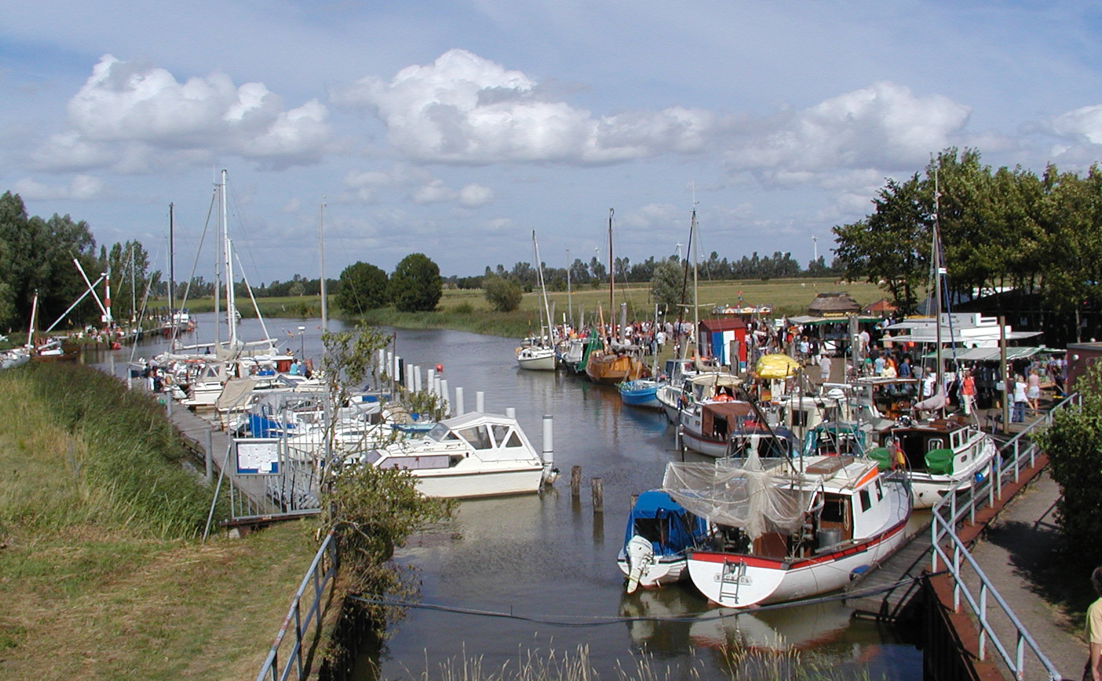 Der Hafen von Neuhaus (Oste) beim Pappbootrennen